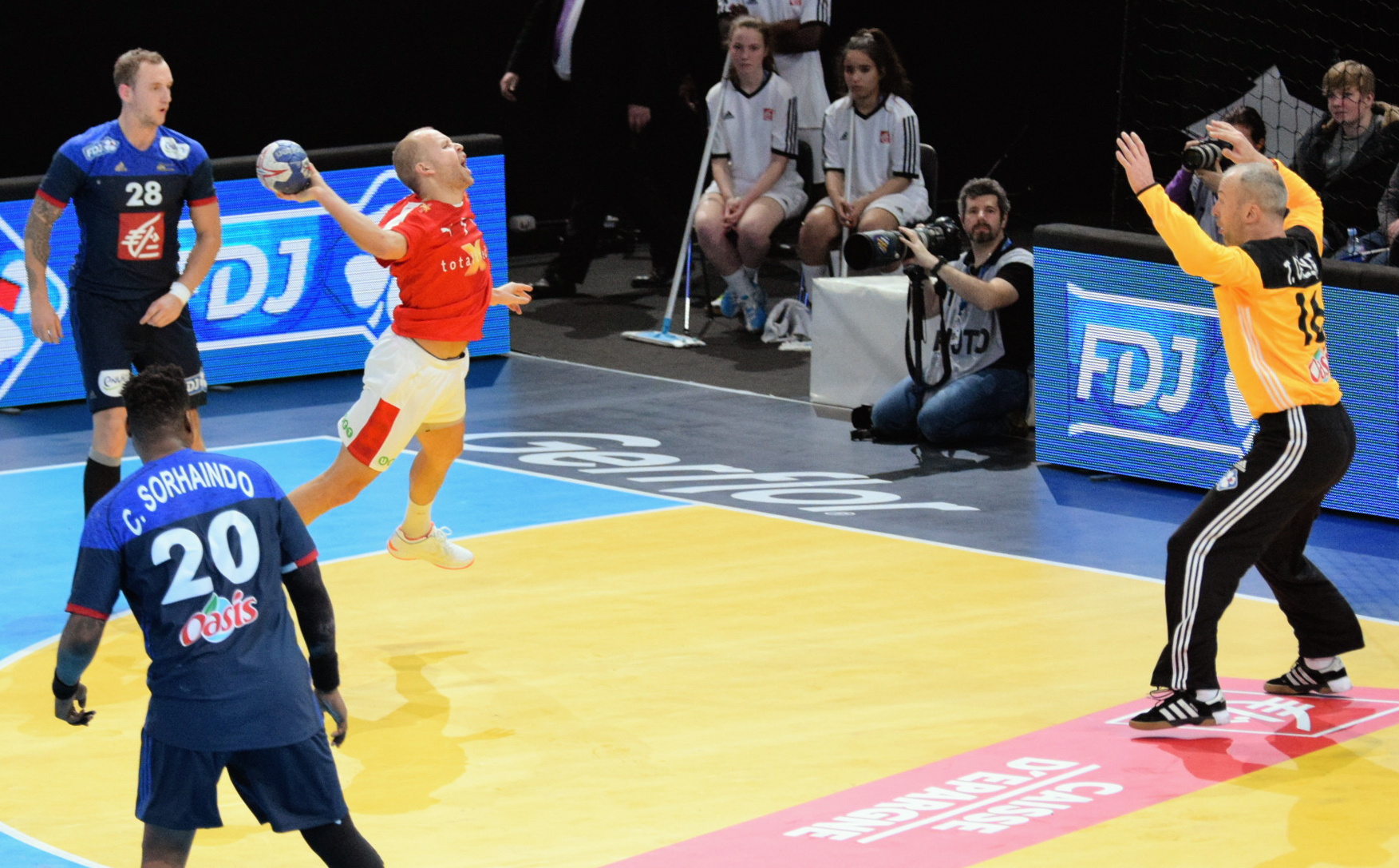 Le 10 janvier 2016 lors du match France / Danemark durant la Golden League à l'AccorHotels Arena (Paris).